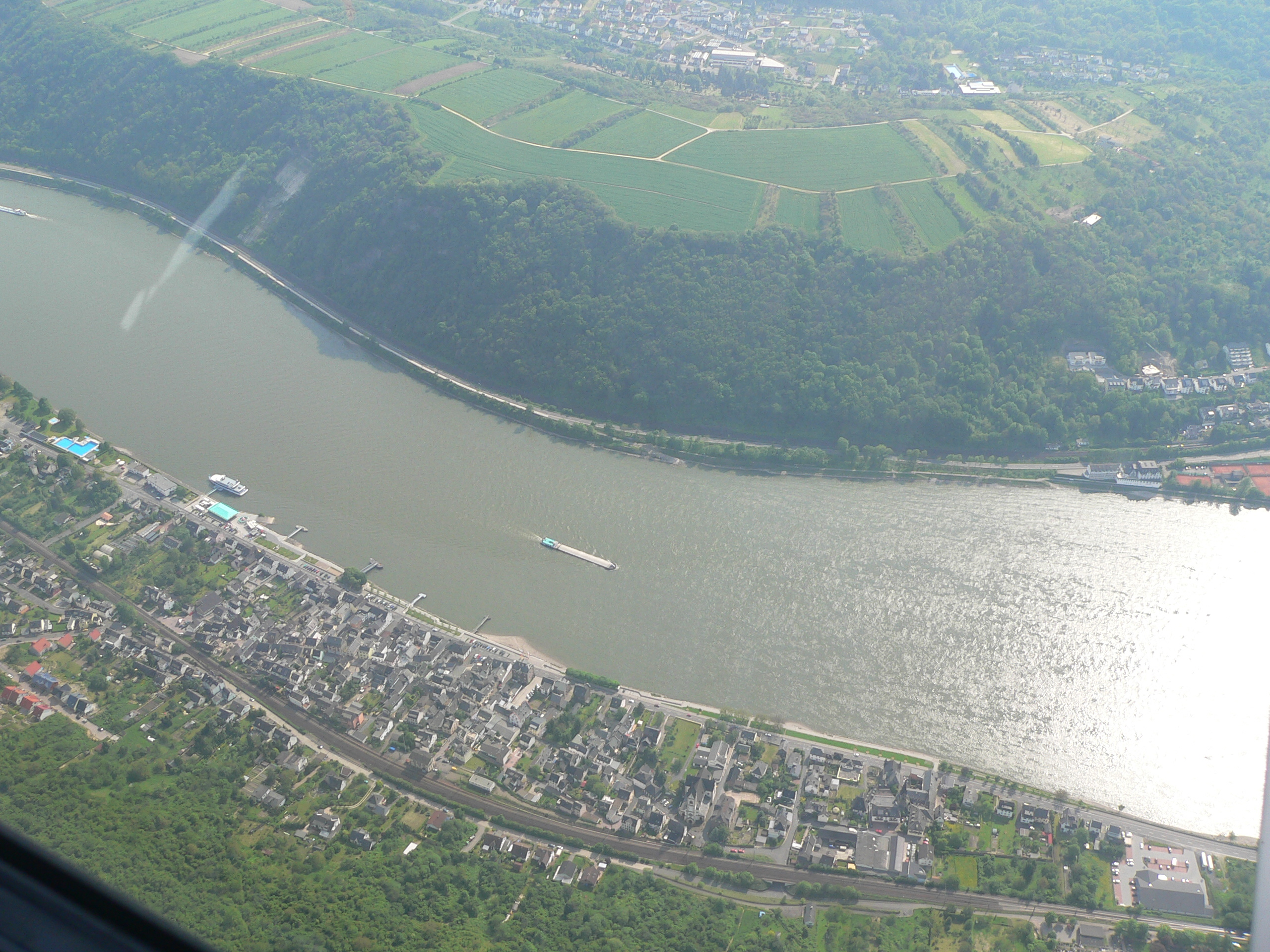 Luftaufnahme von Kamp-Bornhofen